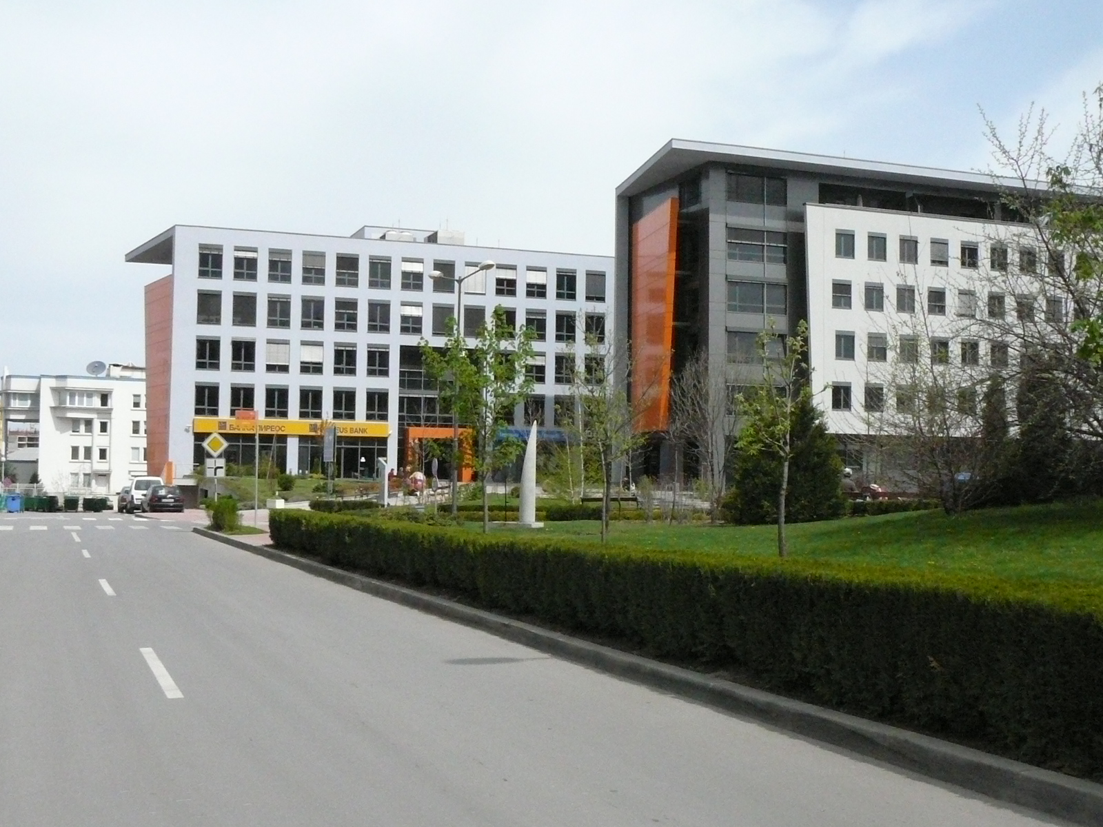 Business Park Sofia, Bulgaria